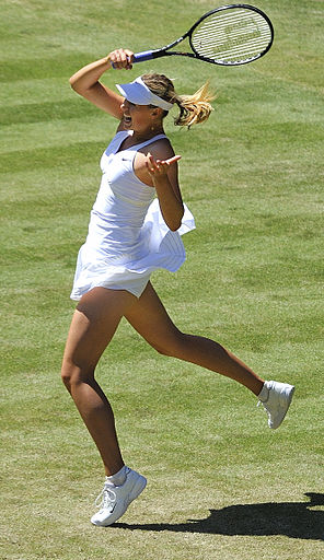 Maria Sharapova – Wimbledon 2009